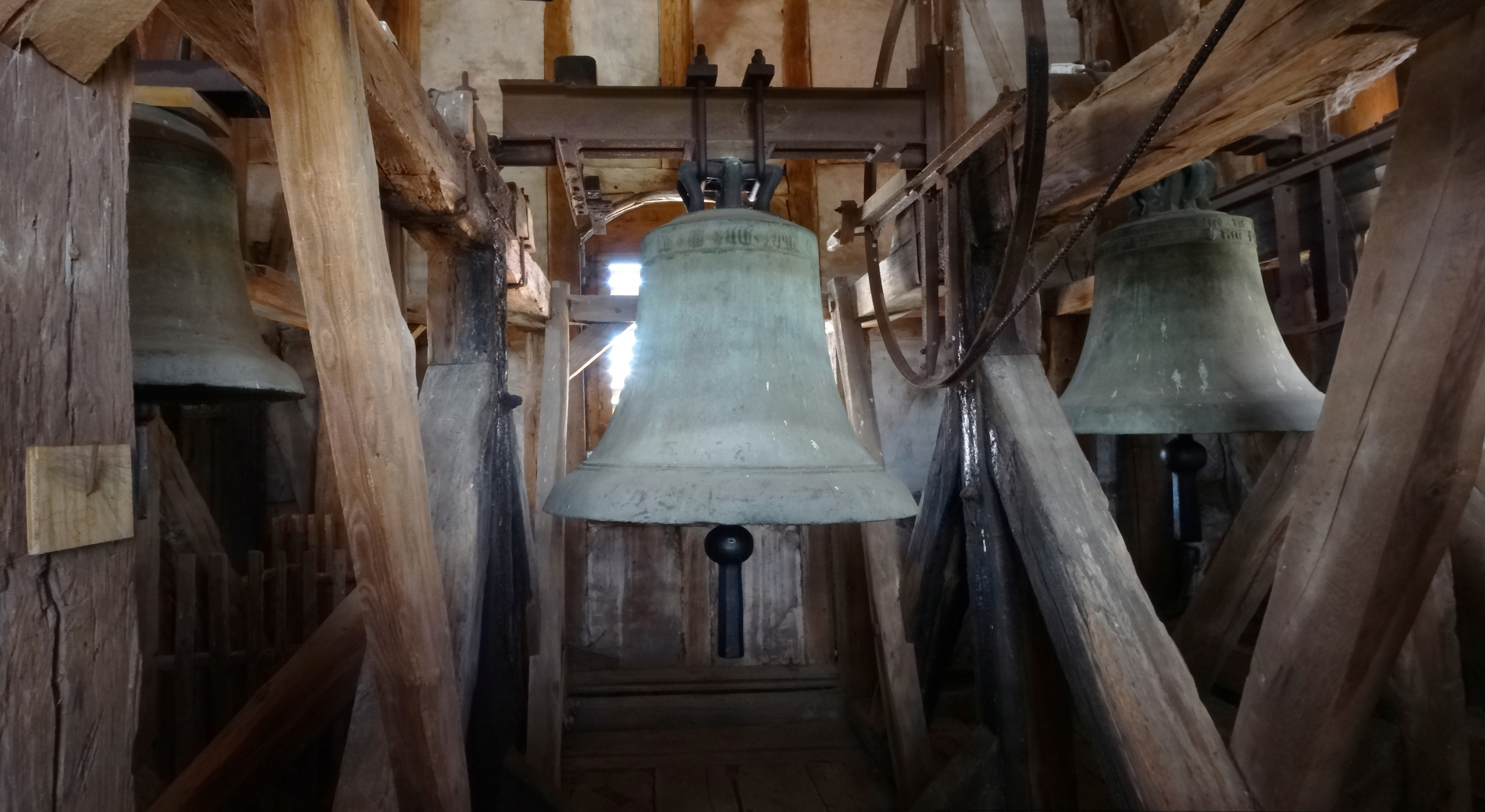 Glockengestühl St. Bartholomäus (Hainrode)